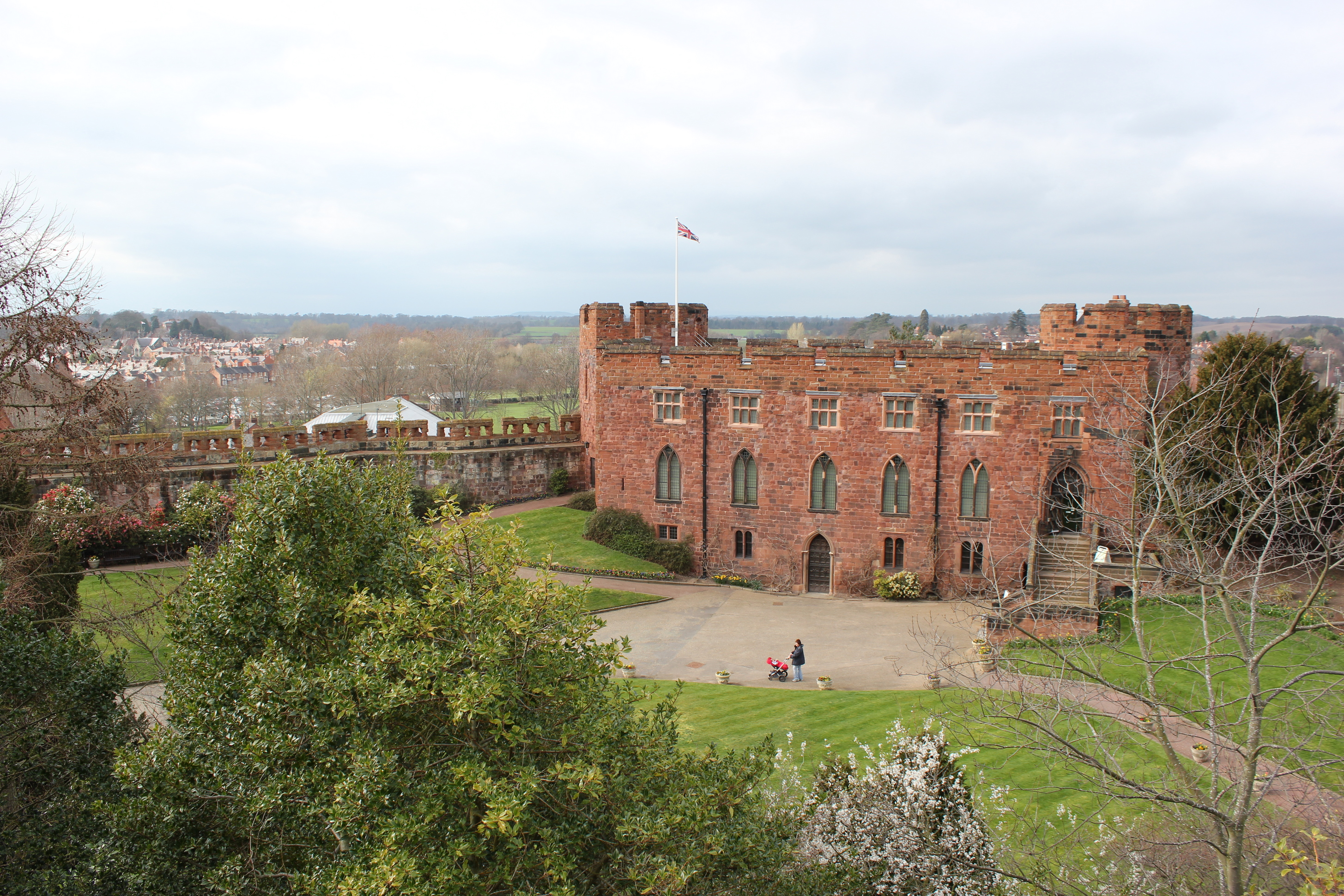 Die Burg von Shrewsbury, England.